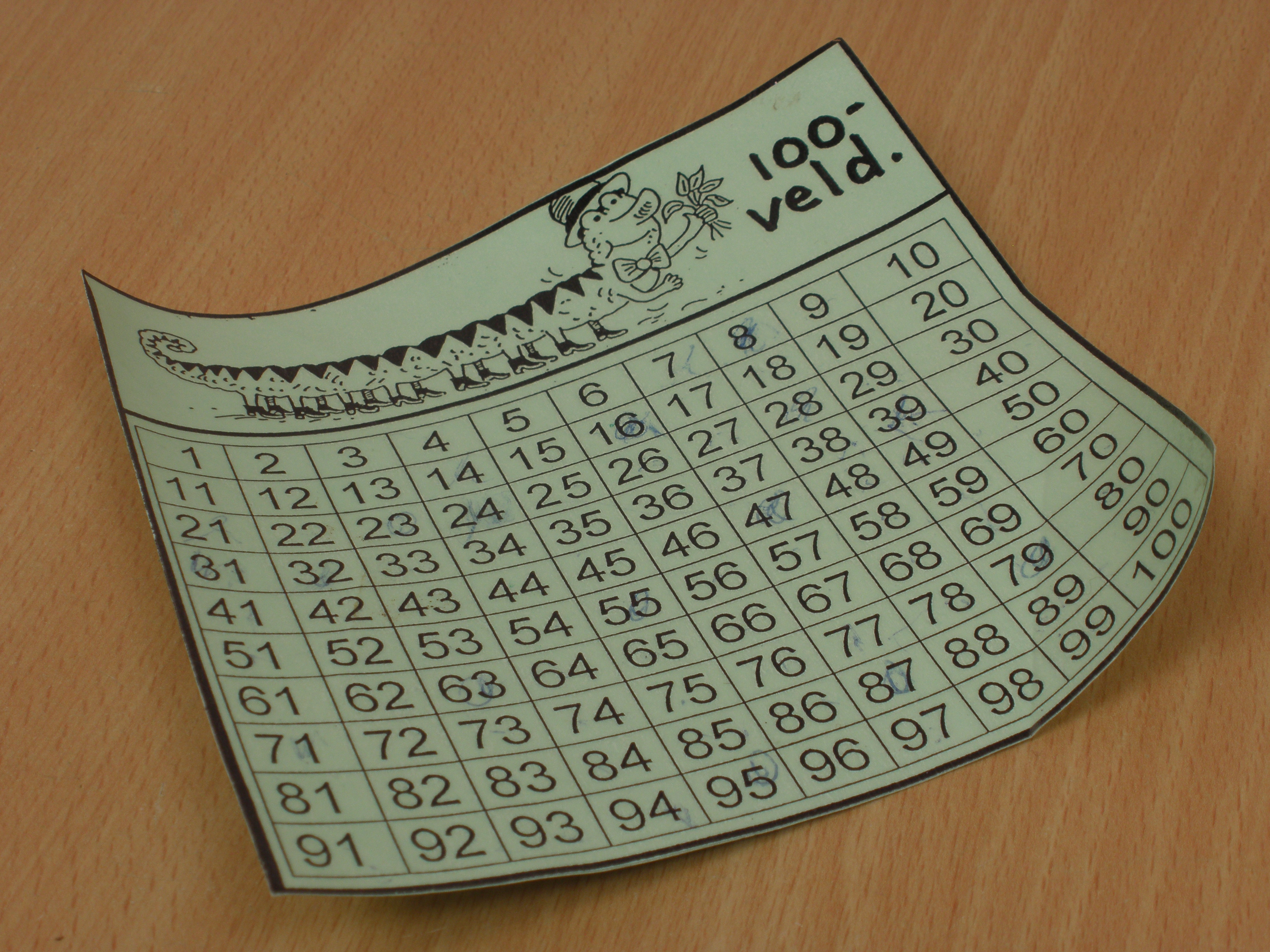 Honderdveld als hulpmiddel bij het leren rekenen.